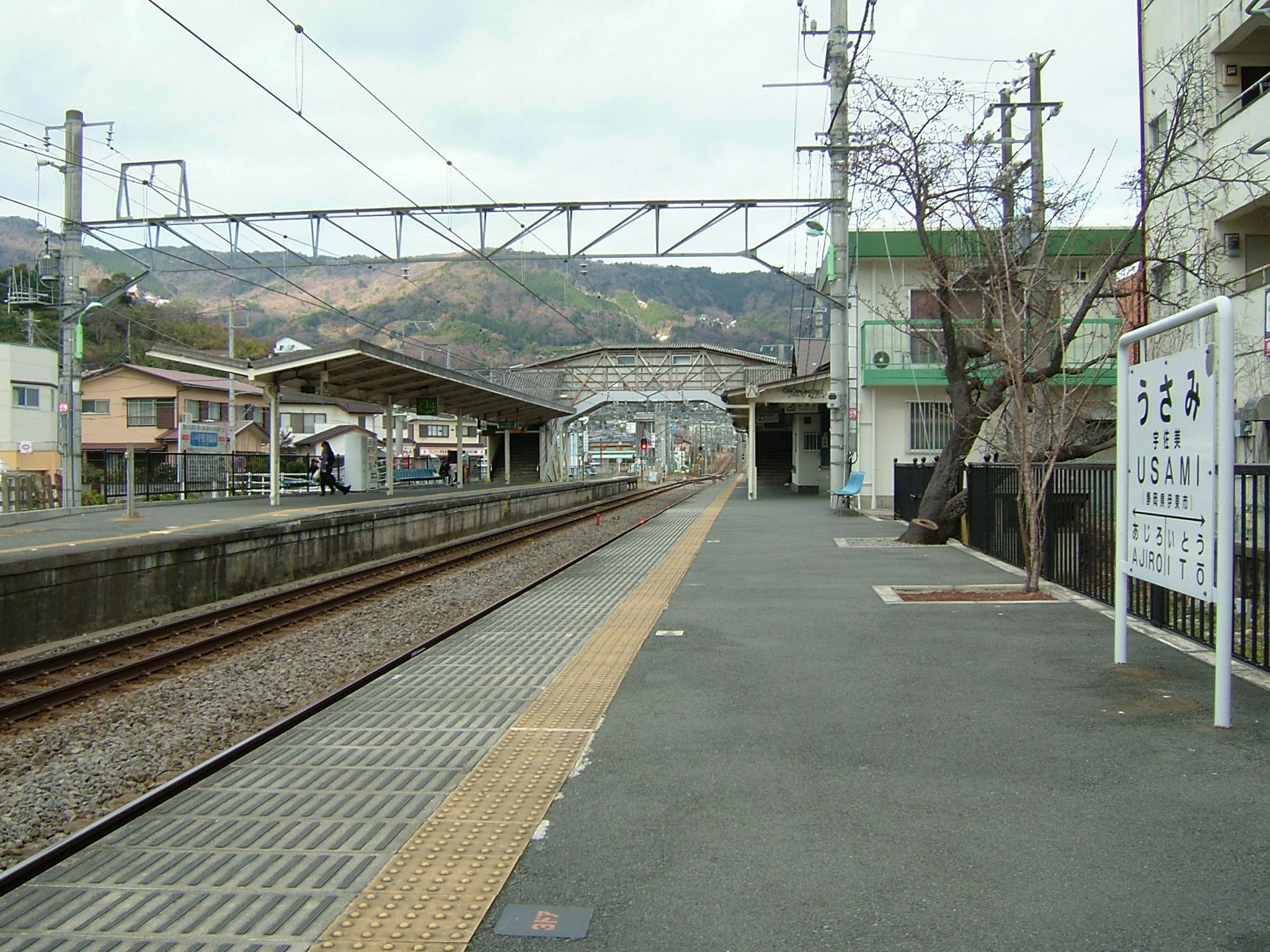 伊東線宇佐美駅プラットホーム（下りホームより撮影）